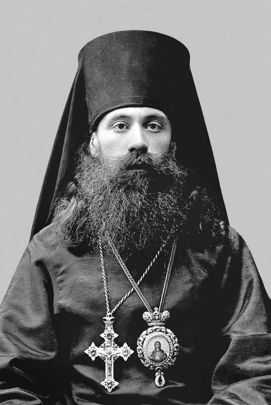 Епископ Кременецкий Дионисий (Валединский). 1913 года